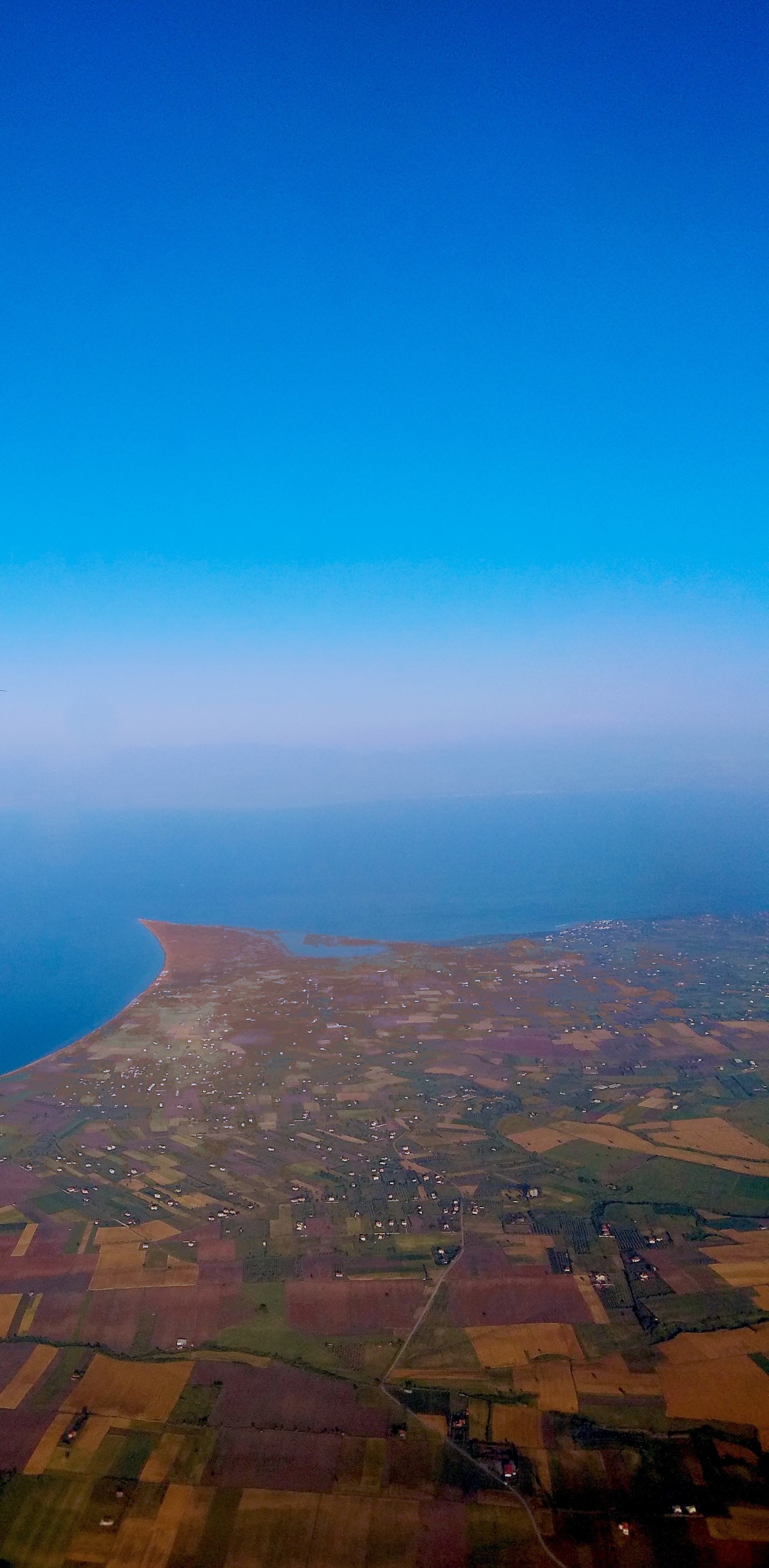 Η λιμνοθάλασσα Επανομής και η παράκτια περιοχή This is a photography of Natura 2000 protected area with ID GR1220012